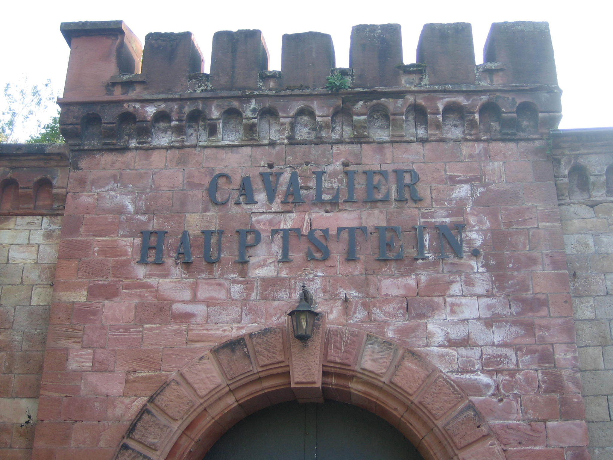 Cavalier Hauptstein der Festung Mainz; Hauptzugang.